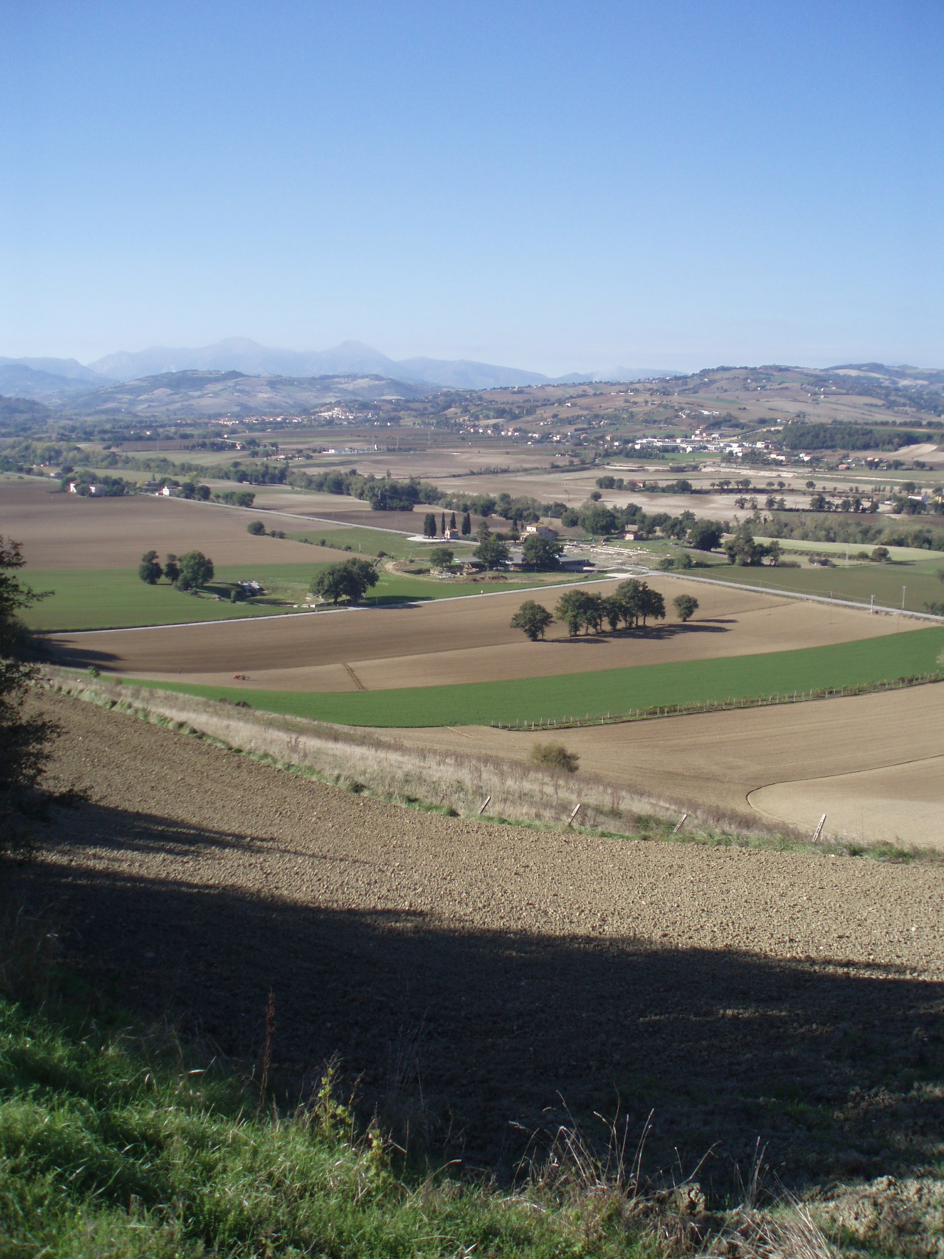 Area archeologica di Suasa - Vista dalla Croce del Termine